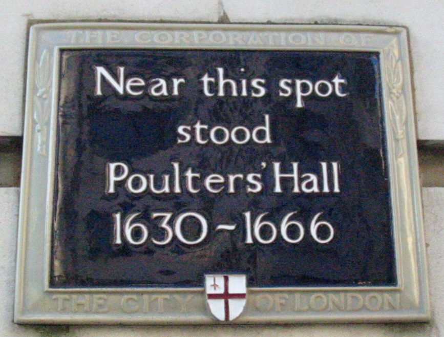 Nrf: Pliaque à Londres